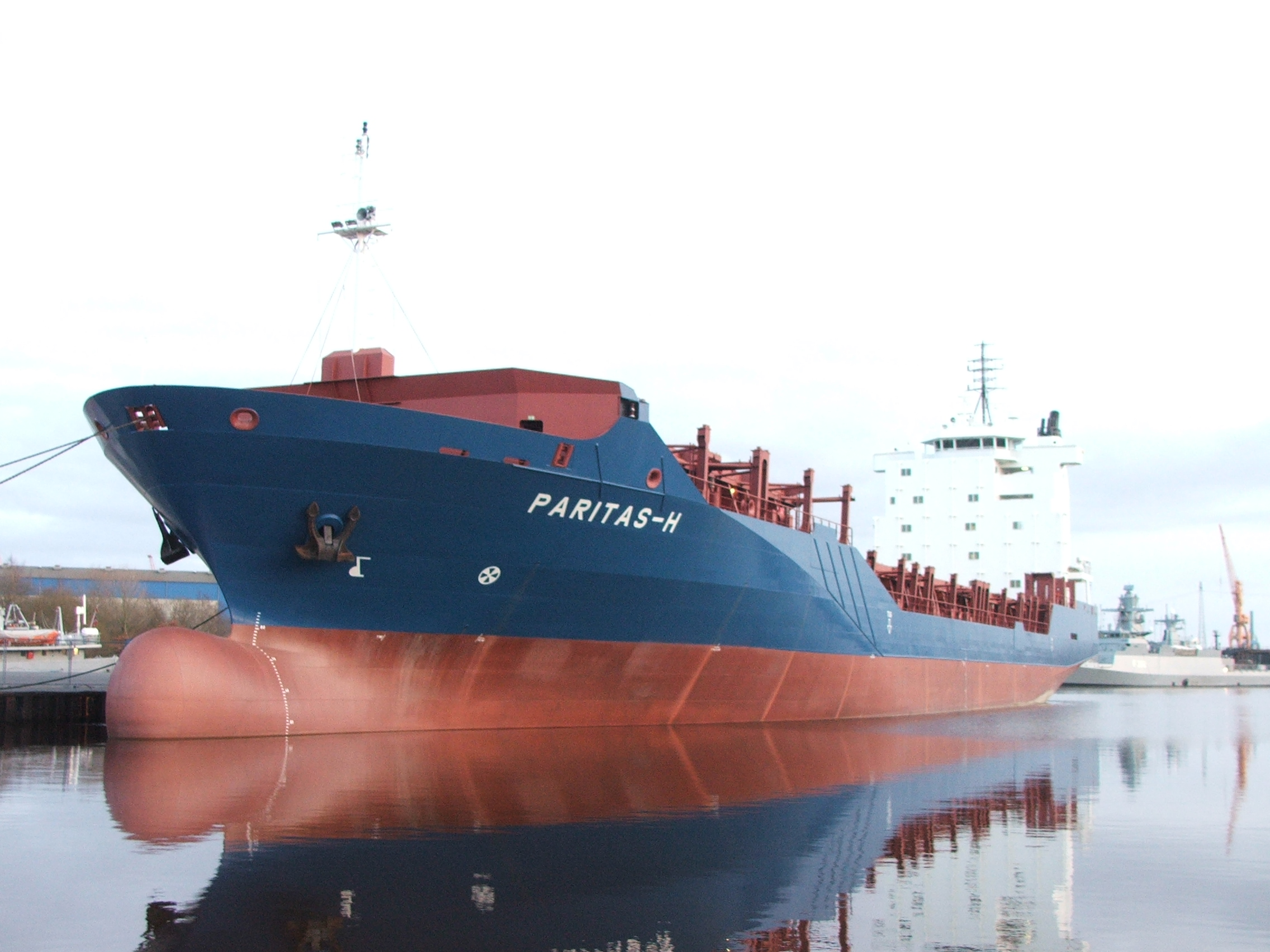 Cassens CW 700 Containerschiff Paritas-H IMO Number: 9388390 MMSI Number: 211434270 Callsign: V2DE4 Length: 127 m Beam: 20 m